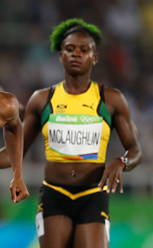 Rio de Janeiro - Eliminatórias do revezamento 4 x 400m nos Jogos Rio 2016, no Estádio Olímpico (Fernando Frazão/Agência Brasil)